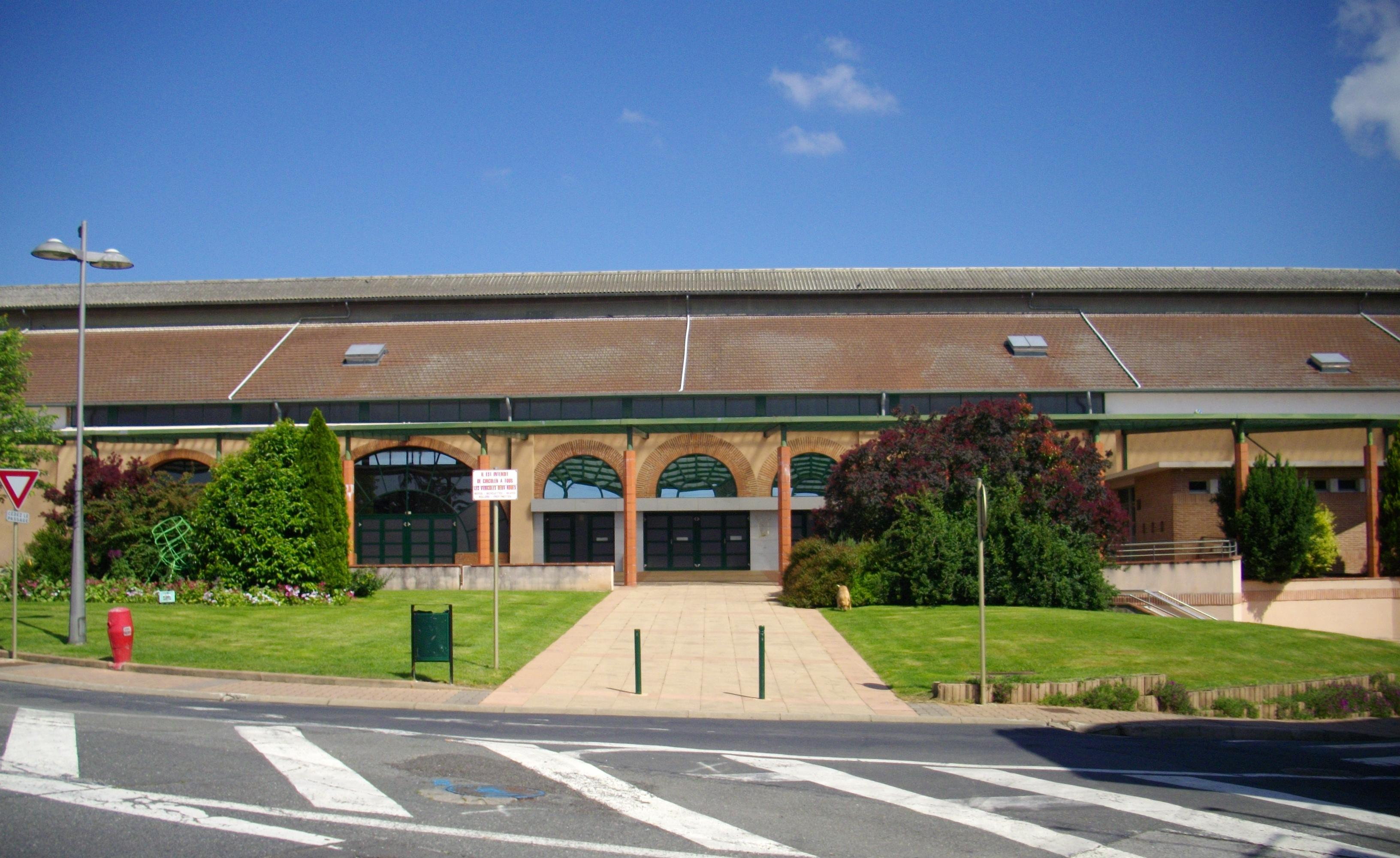 Ancienne verrerie Sainte-Clotilde (1862) située Avenue Jean Jaurès, aujourd'hui transformée en salle polyvalente (dite "Salle François Mitterrand").